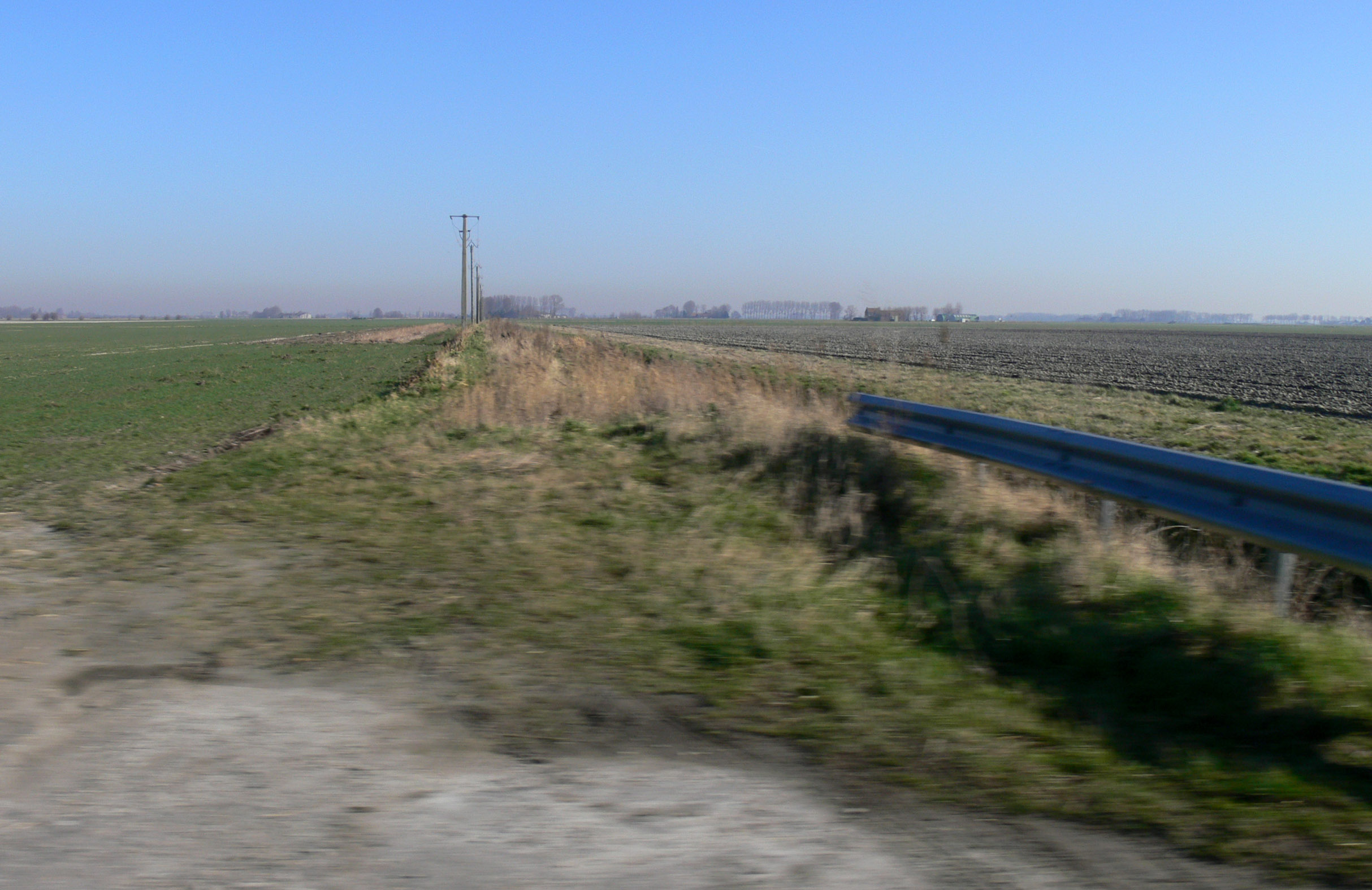 paysage poldérien des moëres, drainés par des fossés dits "watringues" ou "watergang", Flandres maritimes, côté français. Cette zone est aujourd'hui située à environ 2 m sous le niveau moyen de la mer. Jour de pic de pollution (noter l'horizon brunâtre).